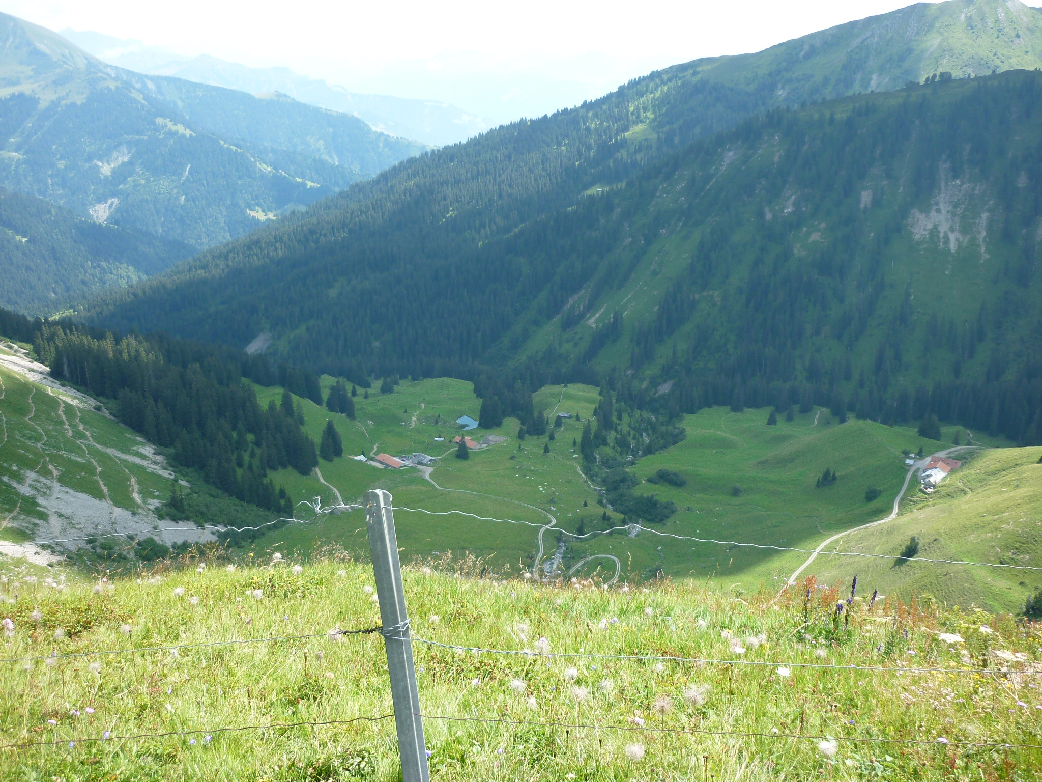 Alp und Walser Wüstung Stürfis, Maienfeld GR, Schweiz